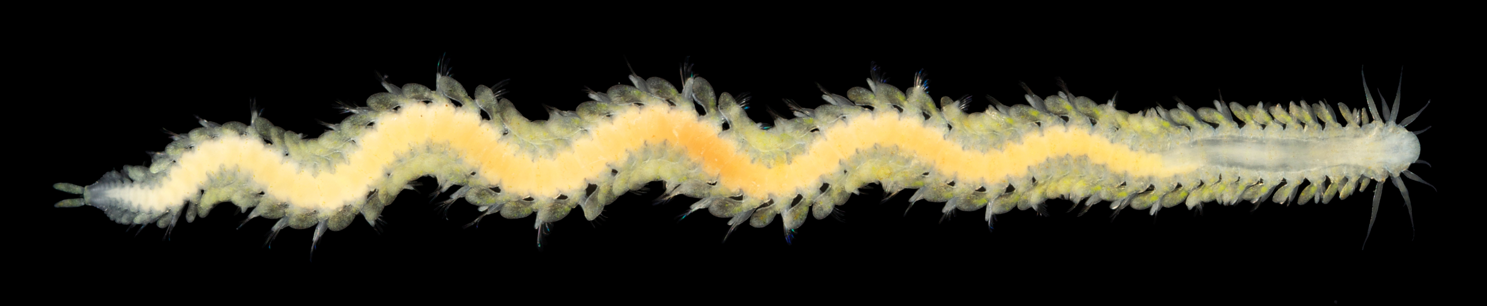 Chaetoparia nilssoni